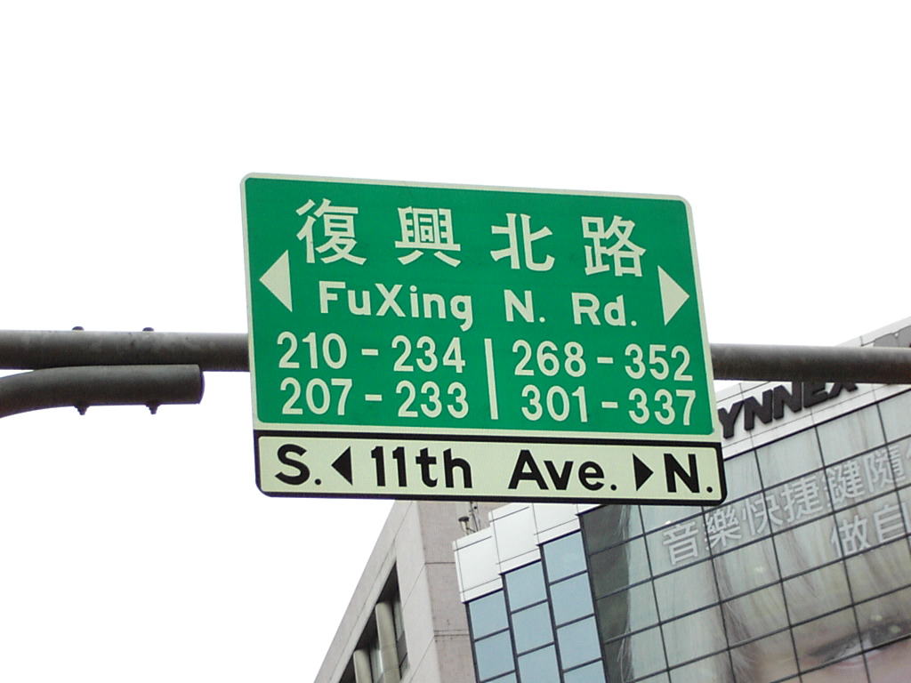 臺北市中山區民生東路三段與復興北路口，聯強國際總部前，復興北路路名標示牌。